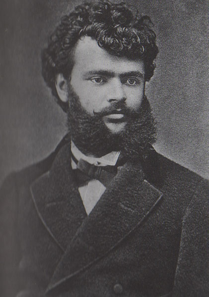 Јован Пачу, лекар и композитор (1847-1902)